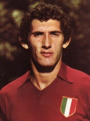 Il calciatore Patrizio Sala. Cartolina promozionale 1976. Licensing Sala, Patrizio, 1976 1976